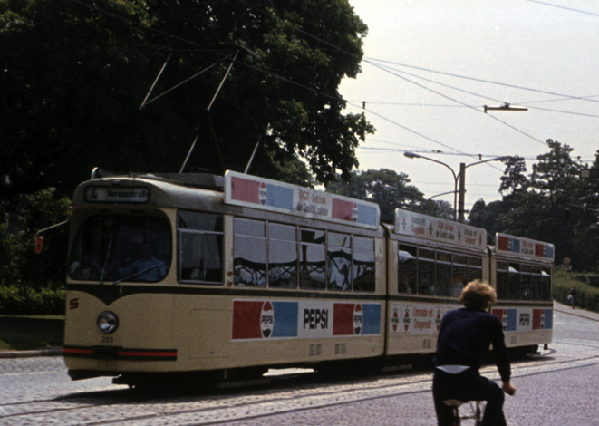 Freiburger GT 8-Tram um 1979